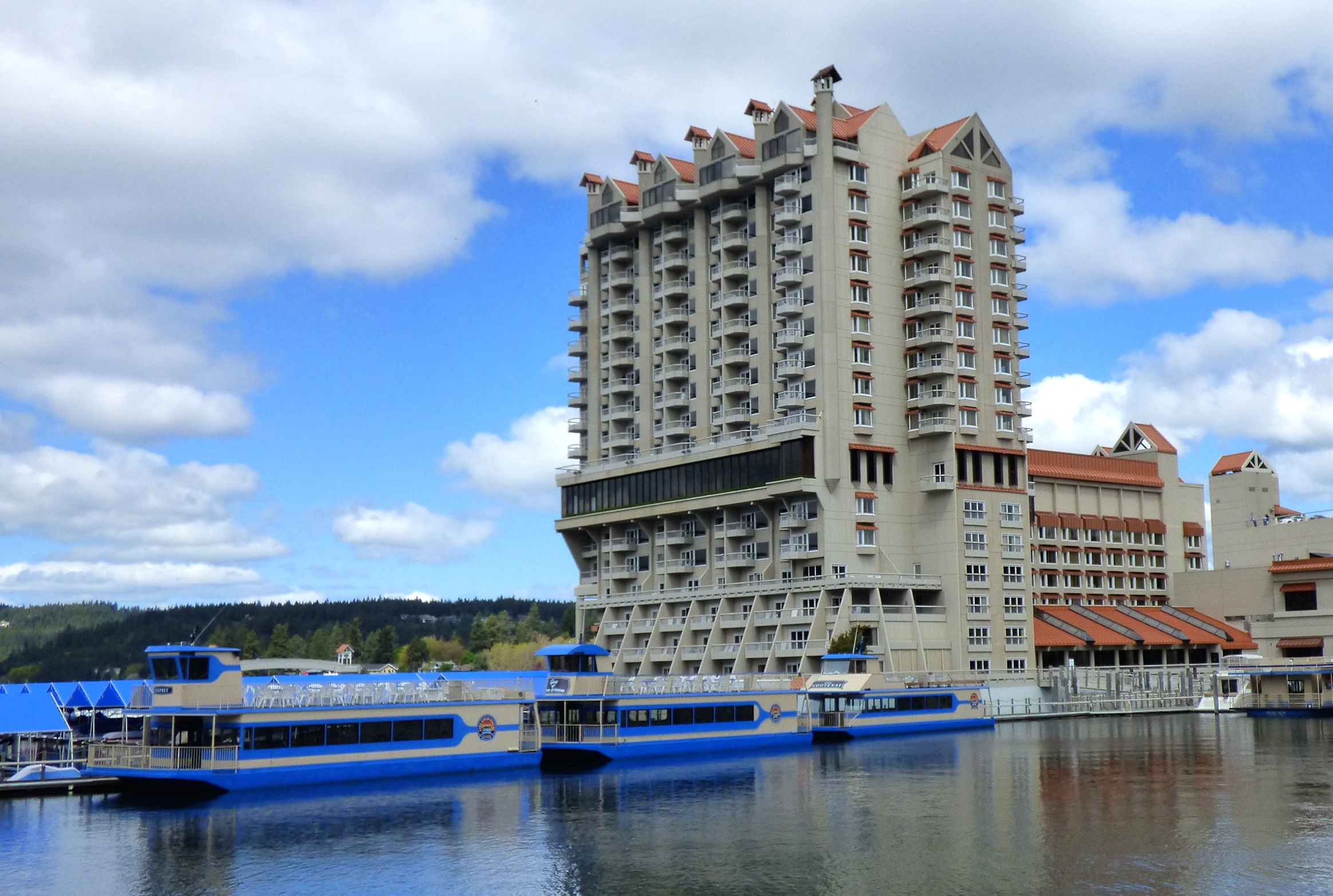 Couer d'Alene Resort hotel, Couer d'Alene, Idaho / 2014